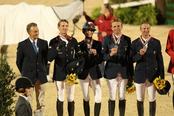 L'équipe de France, vice-championne du Monde des Jeux Equestres Mondiaux de Lexington, en 2010. (de gauche à droite : Jean-Maurice Bonneau, Kevin Staut, Pénélope Leprévost, Olivier Guillon et Patrice Delaveau.)